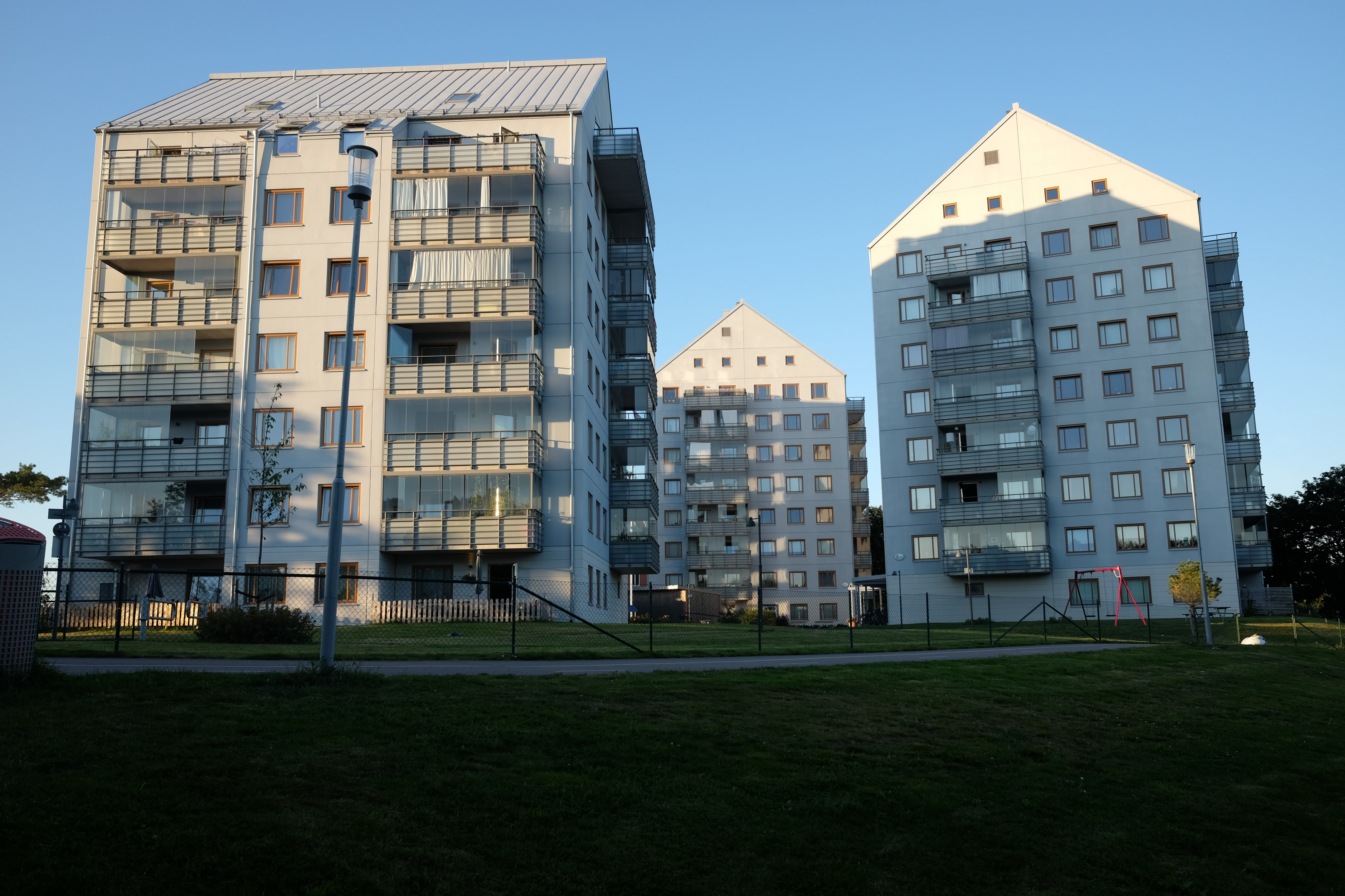 Elins gård i Göteborg.